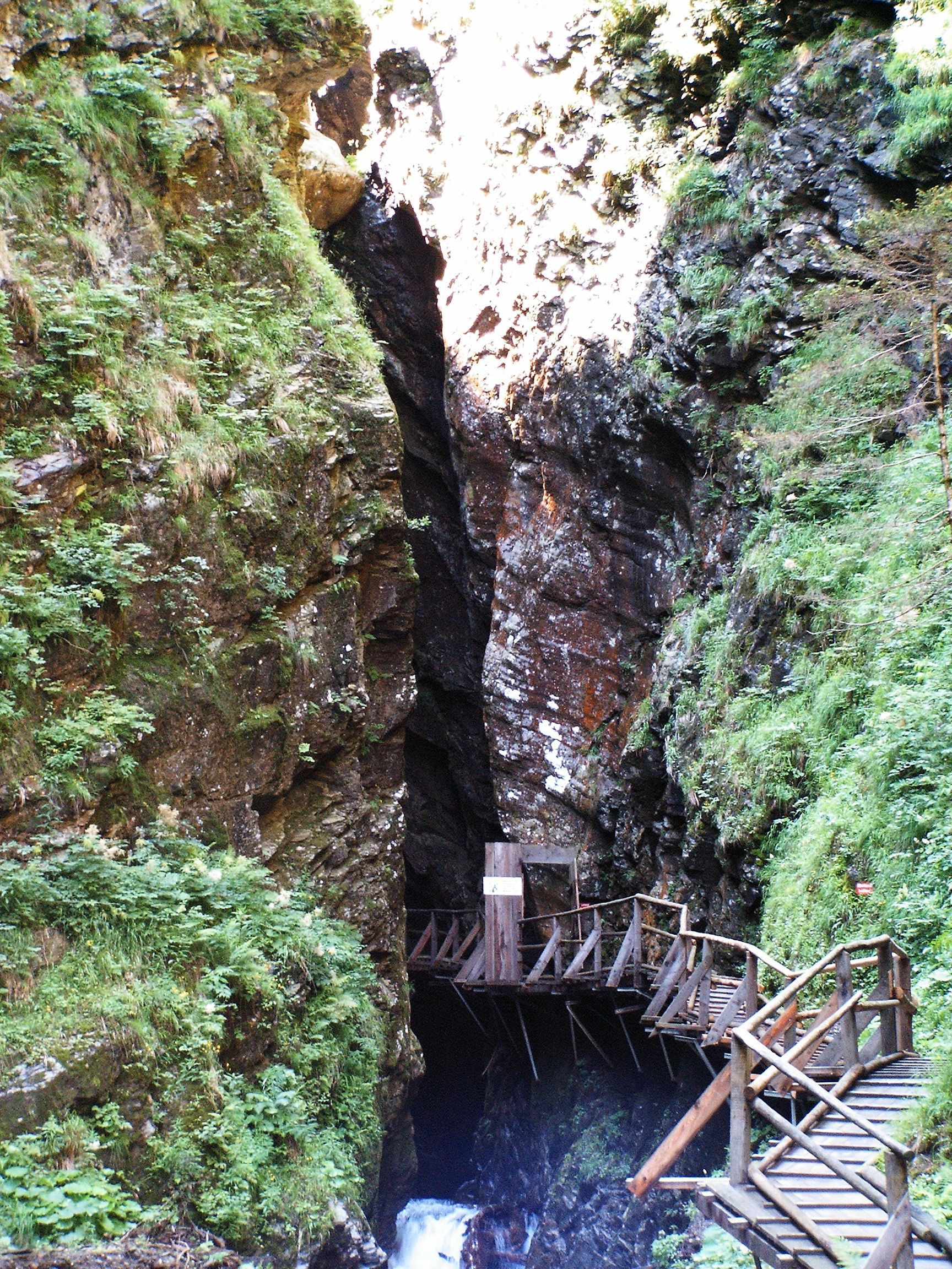 Raggaschlucht bei Flattach / Kärnten